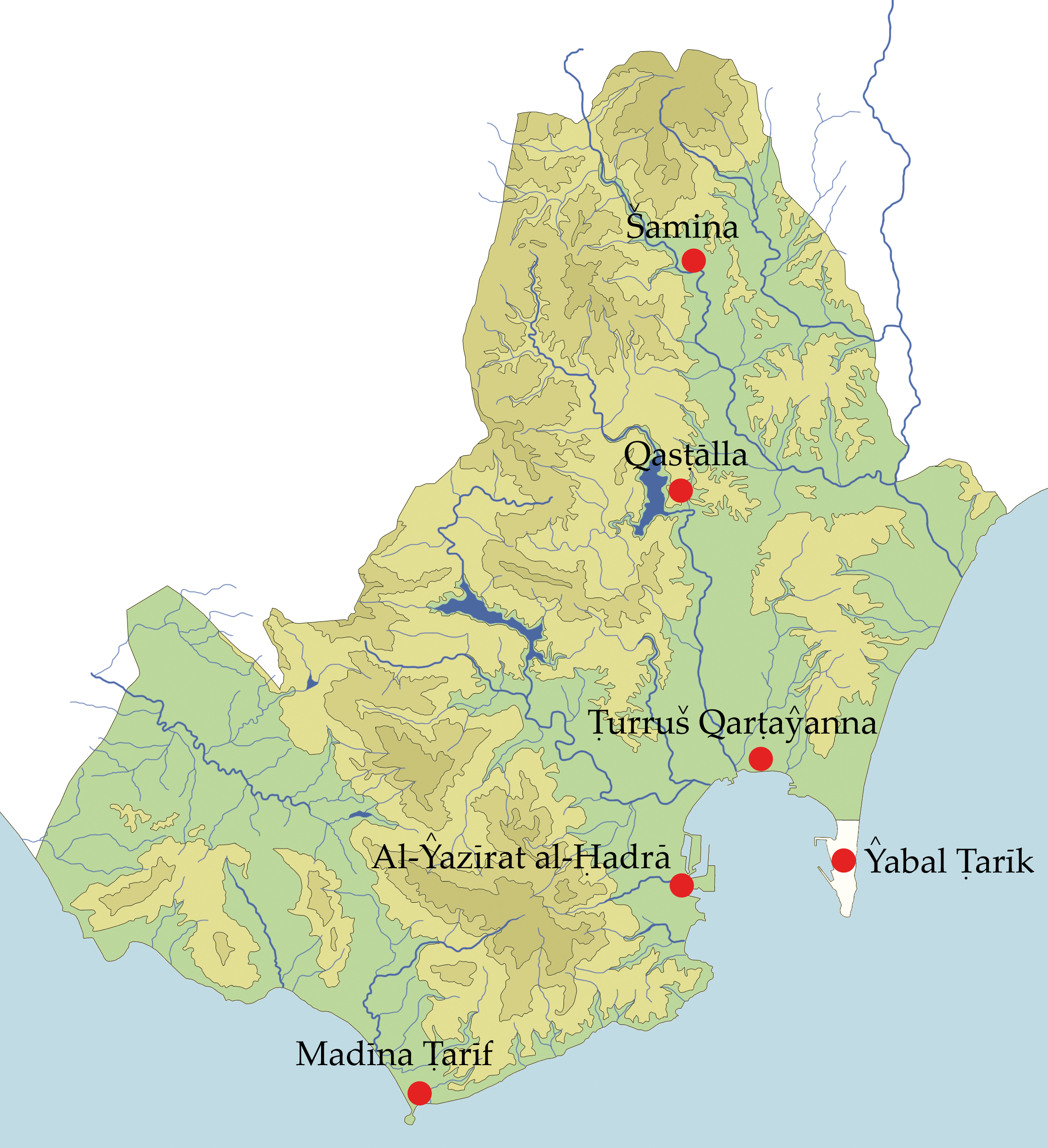 Plano de localidades del Campo de Gibraltar en el siglo XIII.